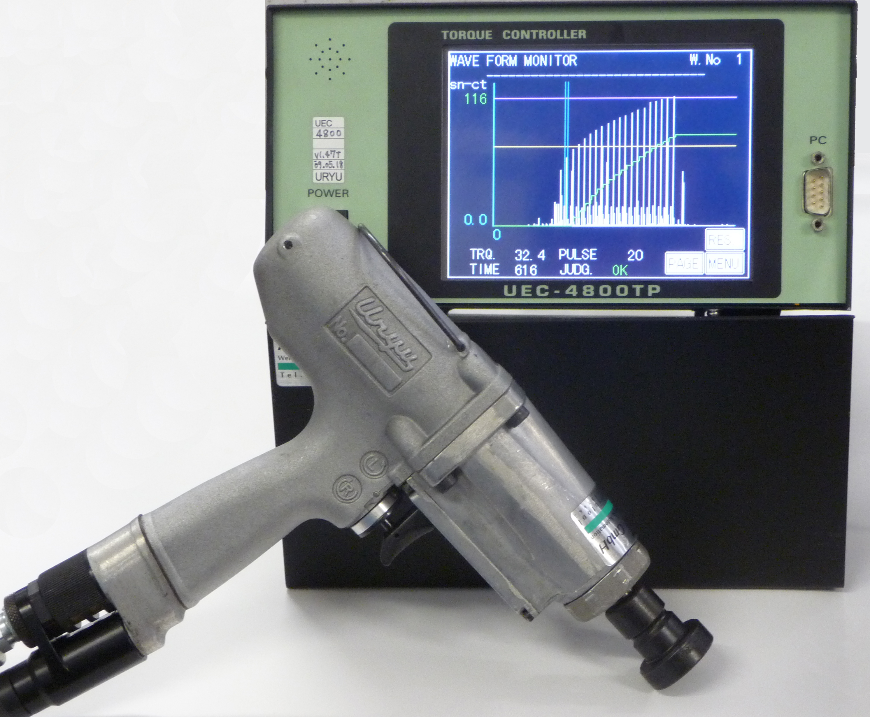 Gesteuerter Impulsschrauber (Marke Uryu) mit Winkelmessung